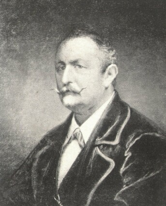 Az idős Madarász Viktor saját kezűleg festett portrait-ja.